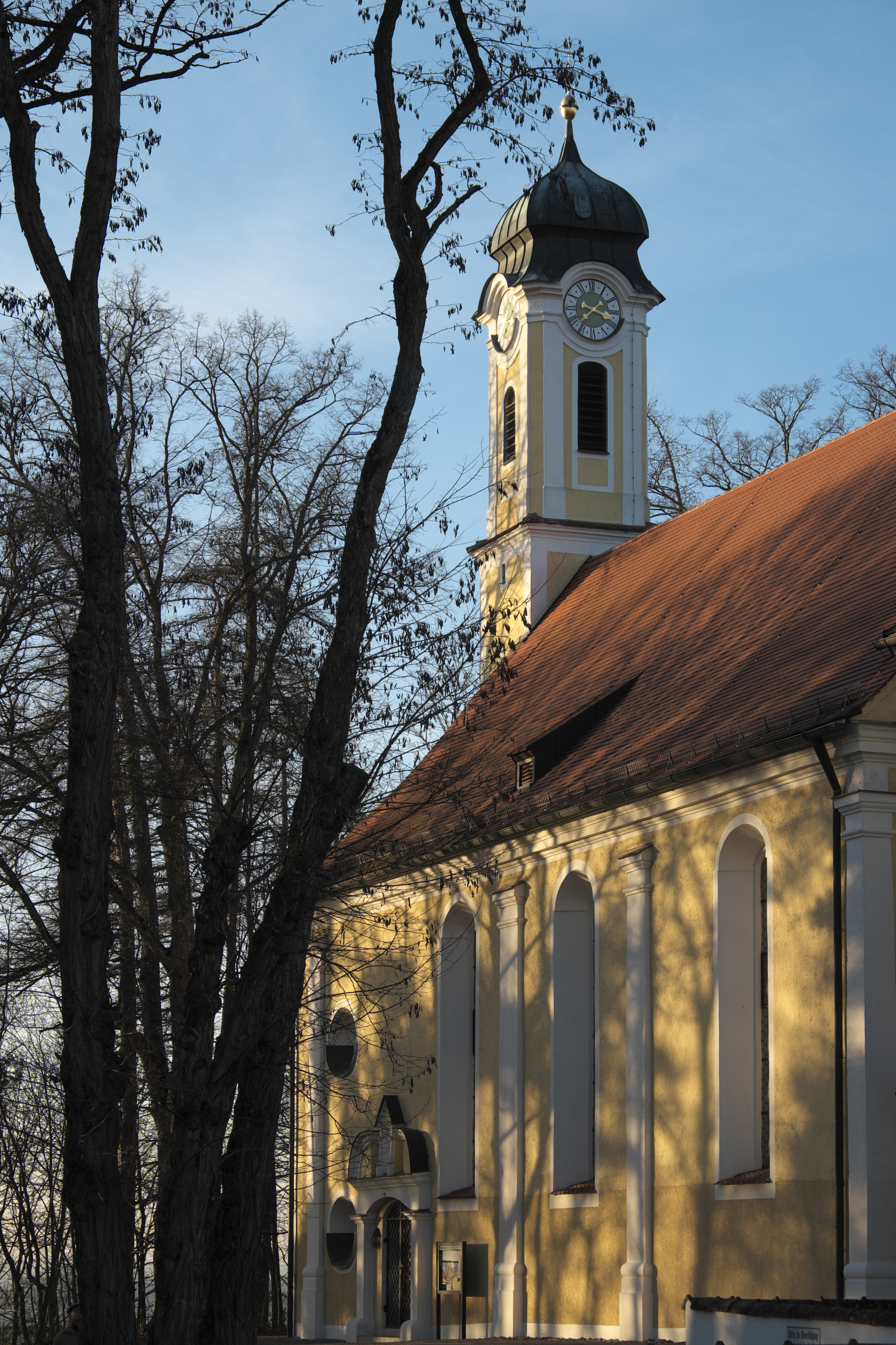 Katholische Pfarrkirche Sankt Wenzeslaus in Oberlauterbach, einem Ortsteil von Aresing im Landkreis Neuburg-Schrobenhausen (Bayern/Deutschland)